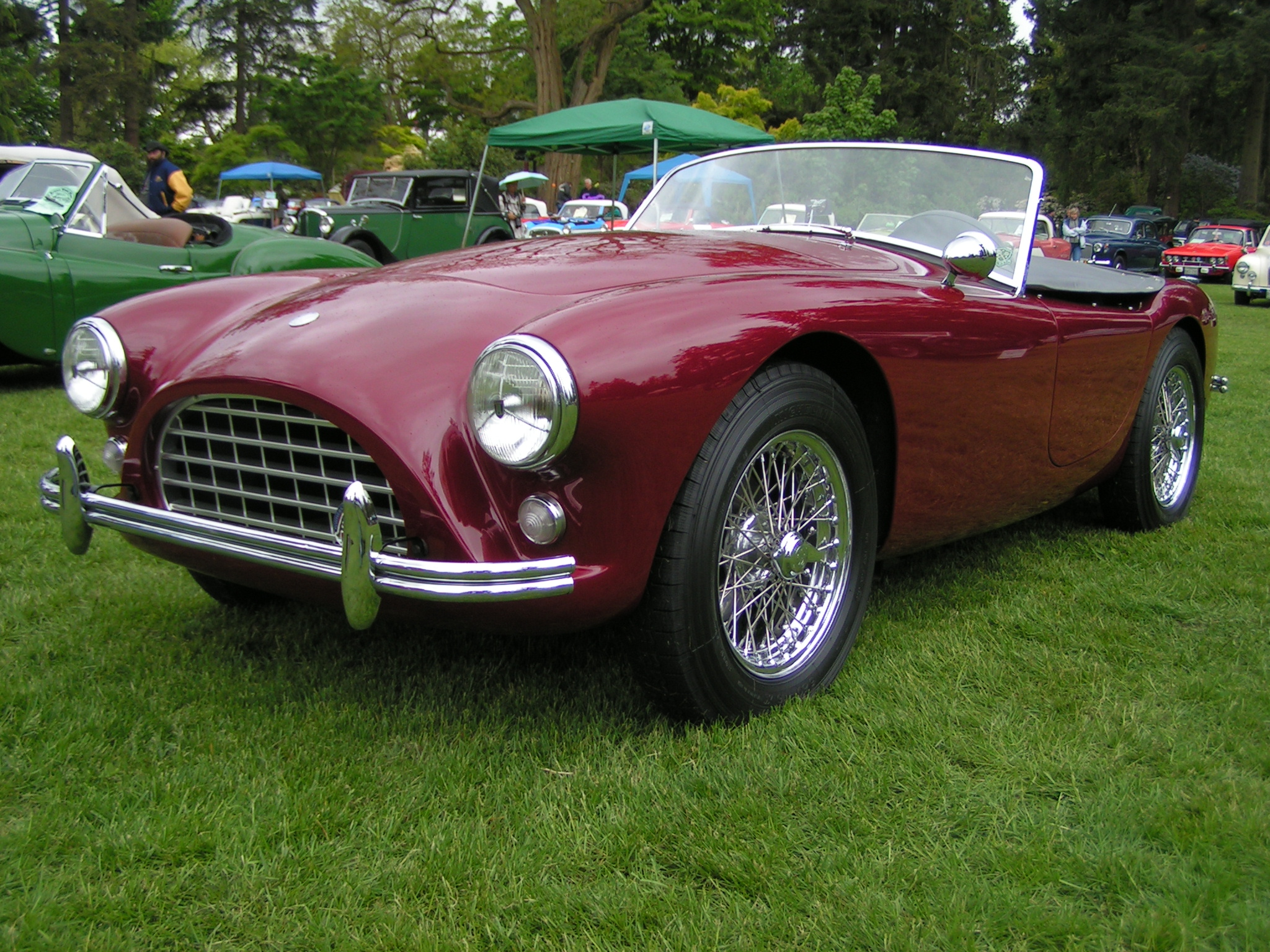 AC AceAc Ace